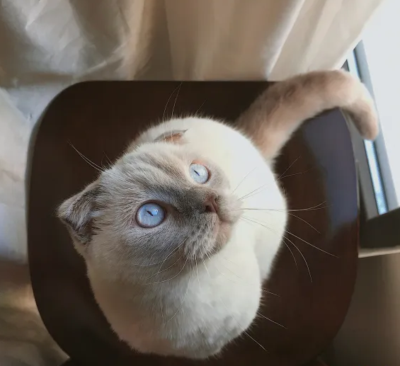 Blue Point Scottish Fold